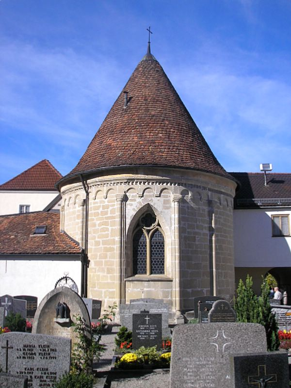 Klosterkirche St. Johannes d. T. (Steingaden, Oberbayern). Die romanische Johanneskapelle. Eigene Aufnahme, Sept. 2006 / Steingaden Monastery (Upper Bavaria, Germany). The romanesque chapel of St. John. Own photo, Sept. 2006